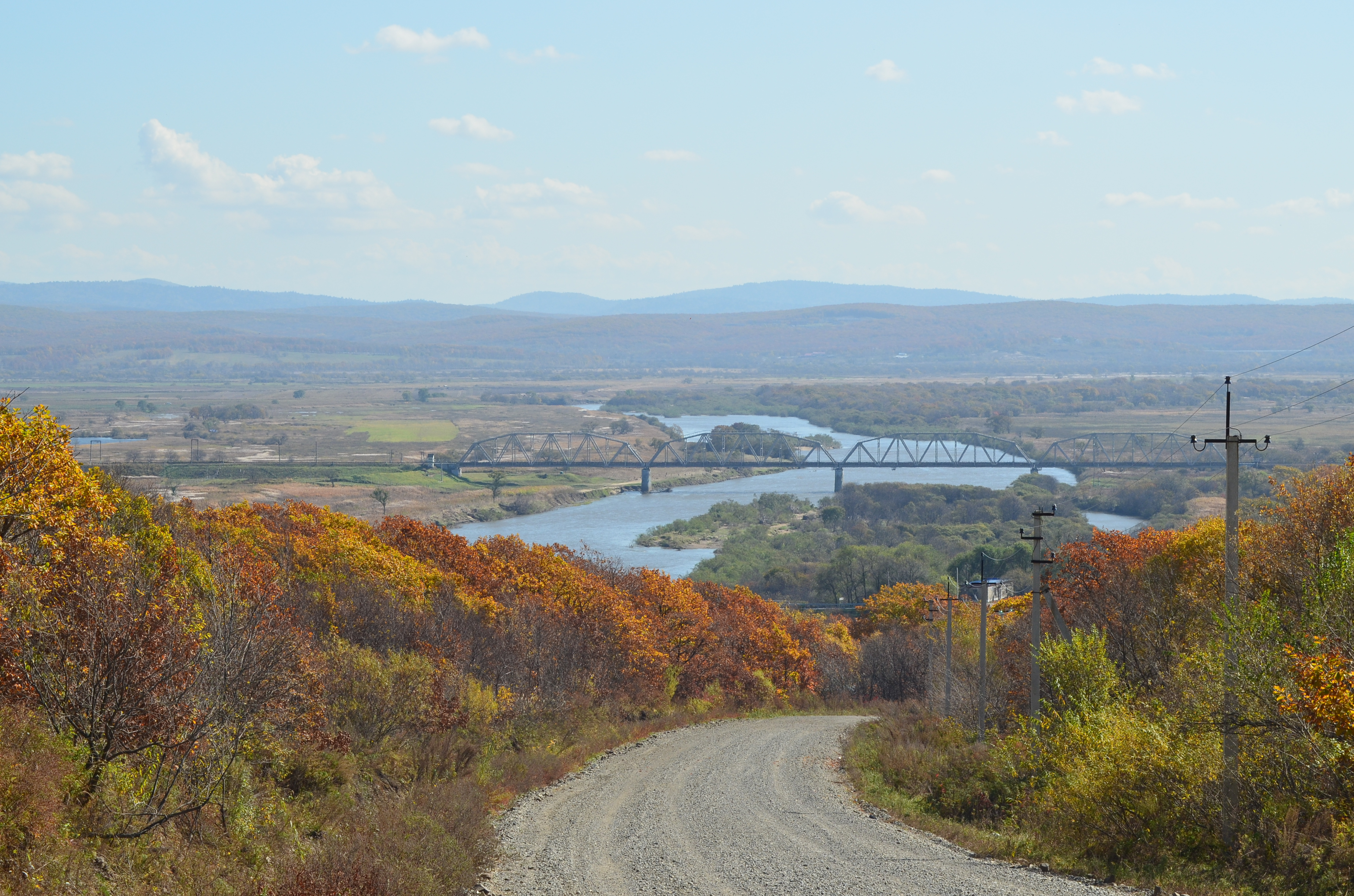 Железнодорожный мост через реку Раздольная. Железнодорожная линия Барановский — Хасан